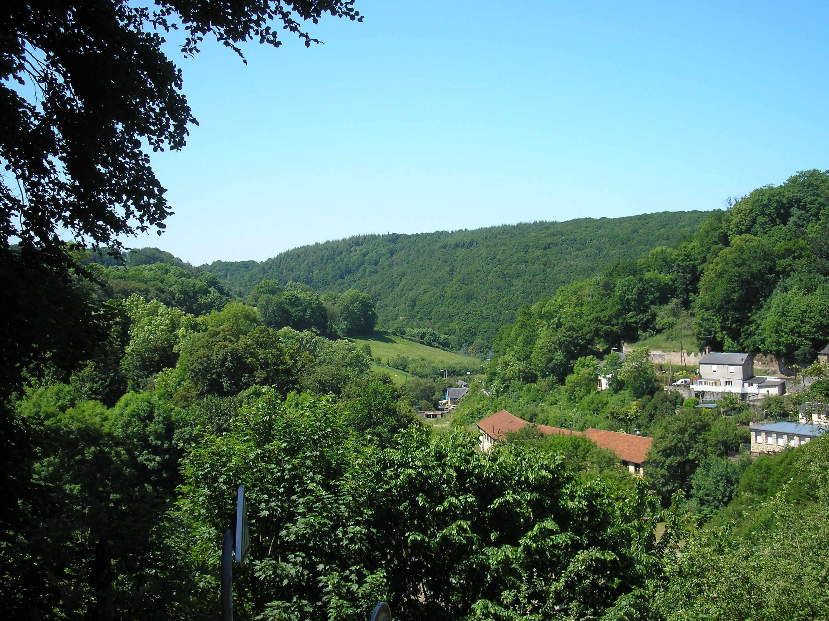 Vire (Normandie, France). Les vaux de Vire. Le site serait à l'origine du terme vaudeville.